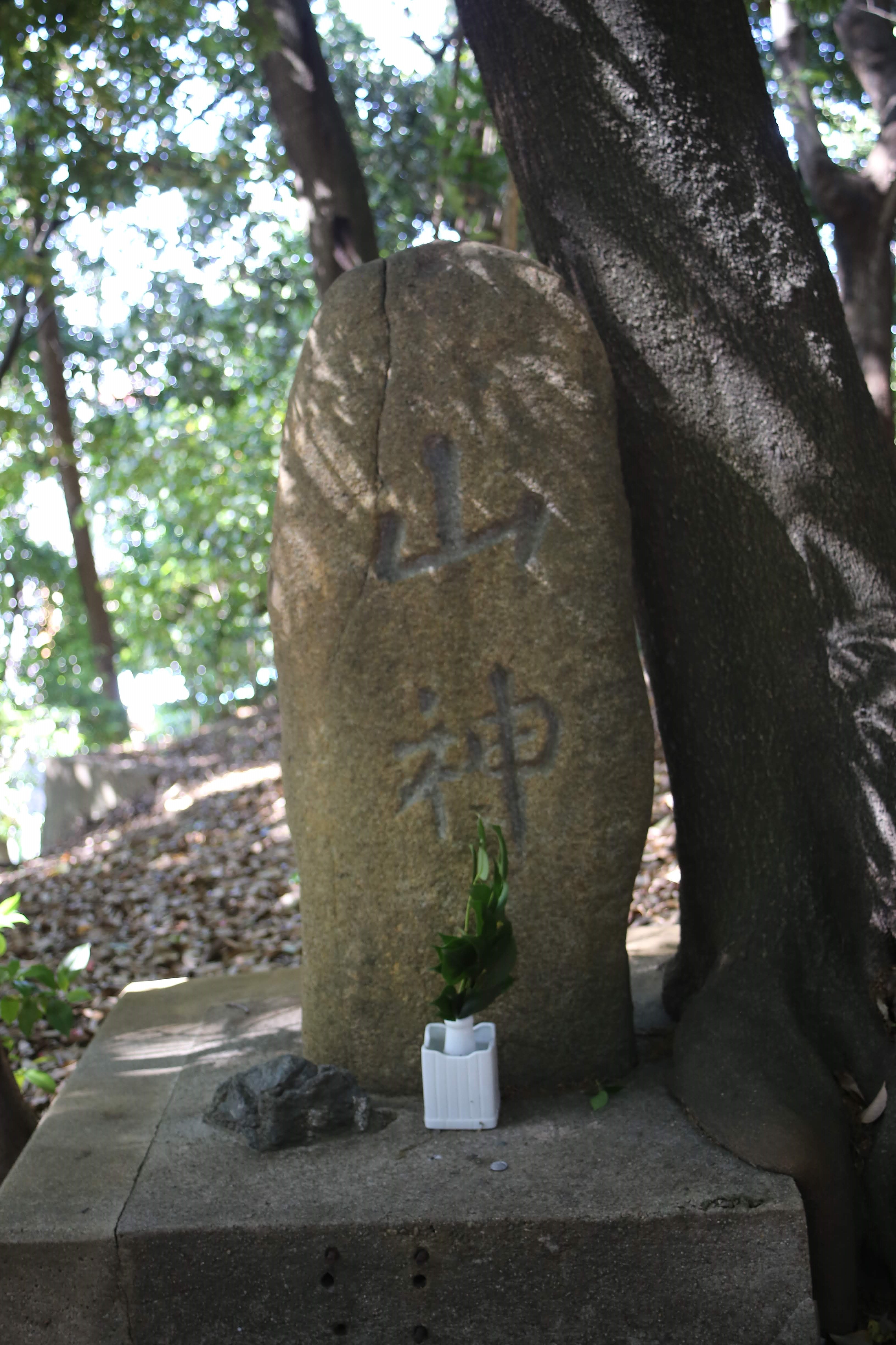 名古屋市守山区市場の白山社境内に鎮座する「山神」の碑